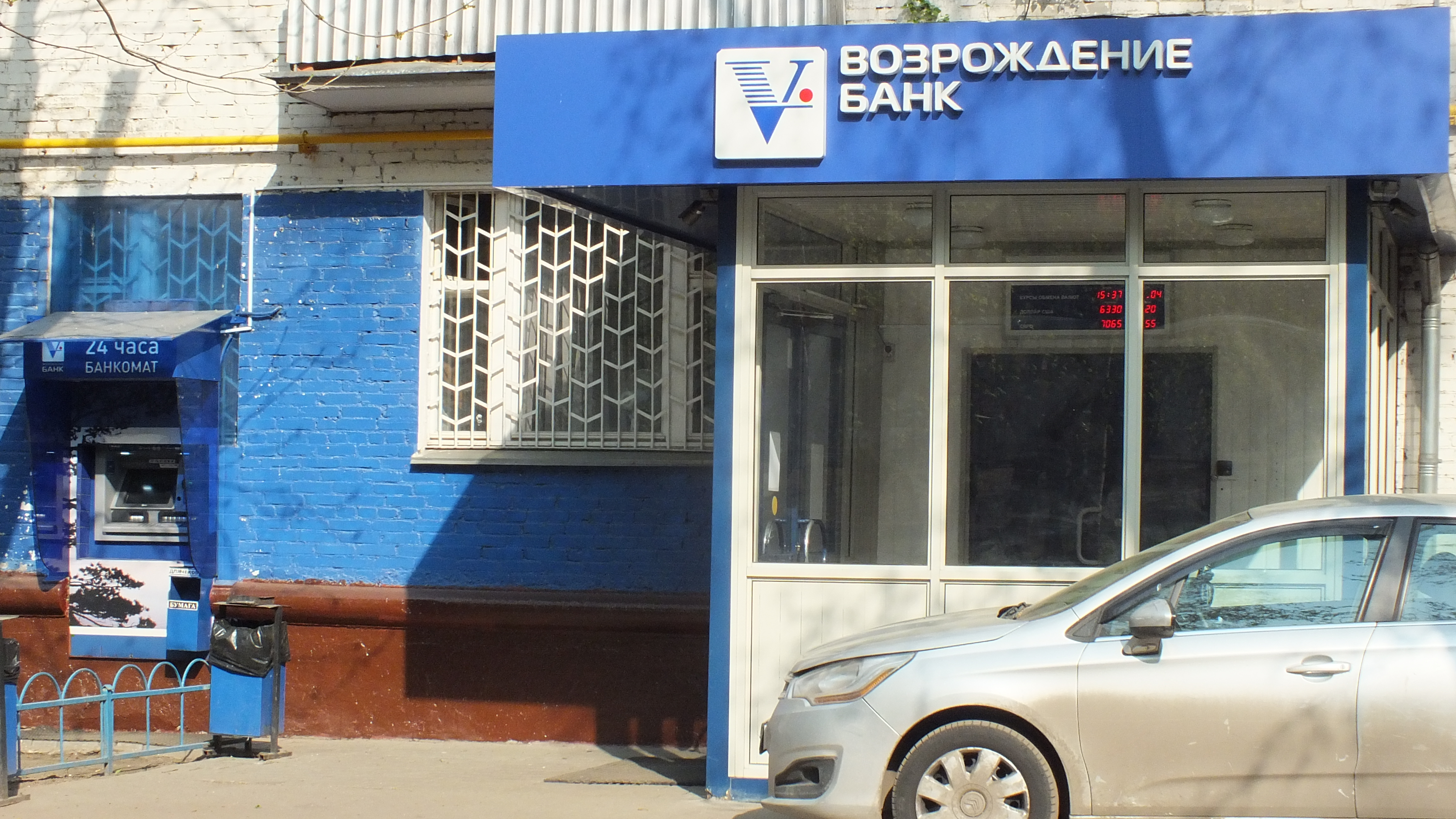 Отделение банка «Возрождение» на Весёлой улице в Москве, расположено прямо в подъезде одного из домов советского типа постройки («хрущёвка»).